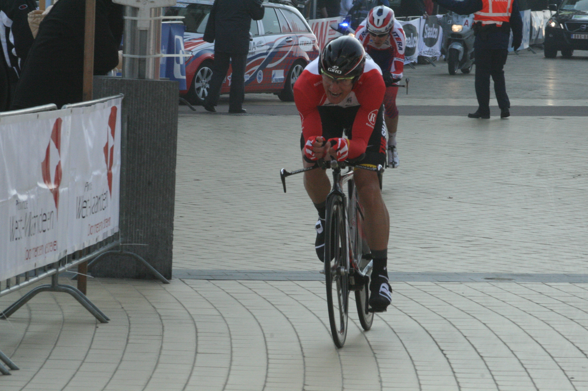 Driedaagse van West-Vlaanderen 2011, proloog in Middelkerke